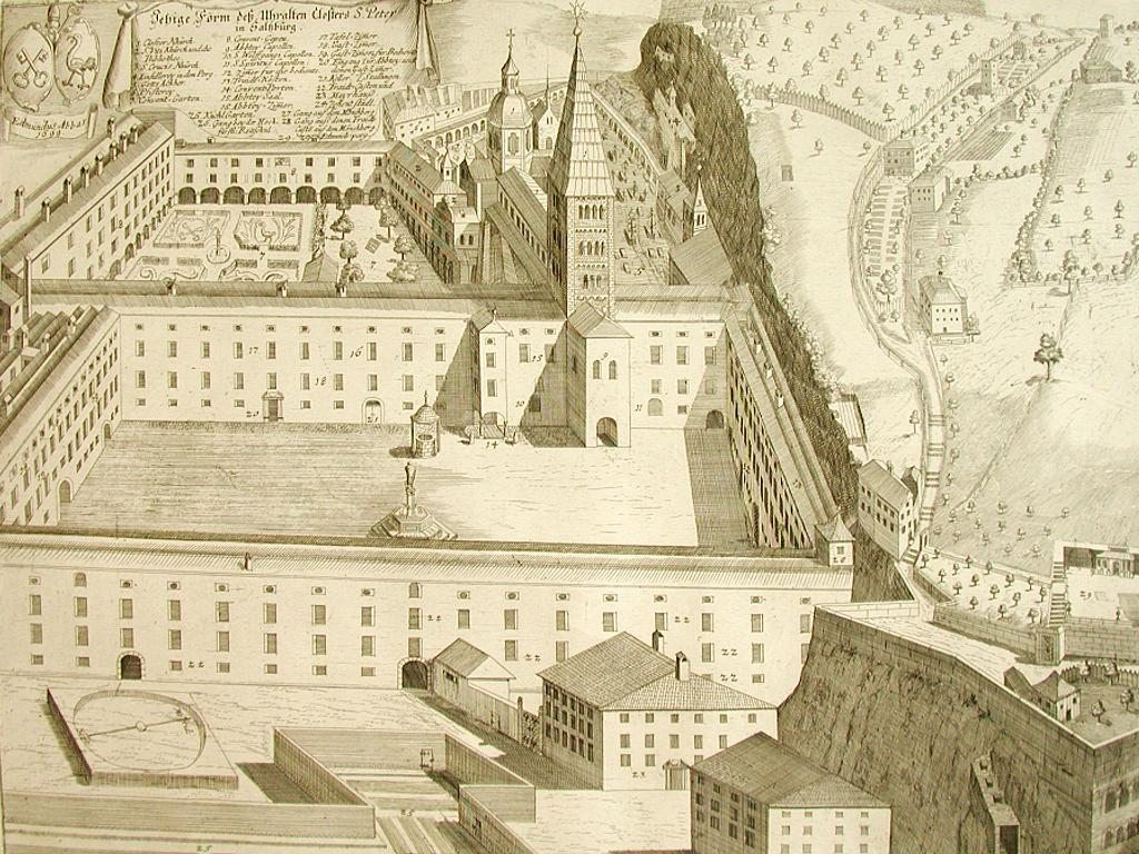 Georg Joseph Sigmund: Jetzige Form deß uhralten Closters S. Peter in Saltzburg, Kuperstich, 1699